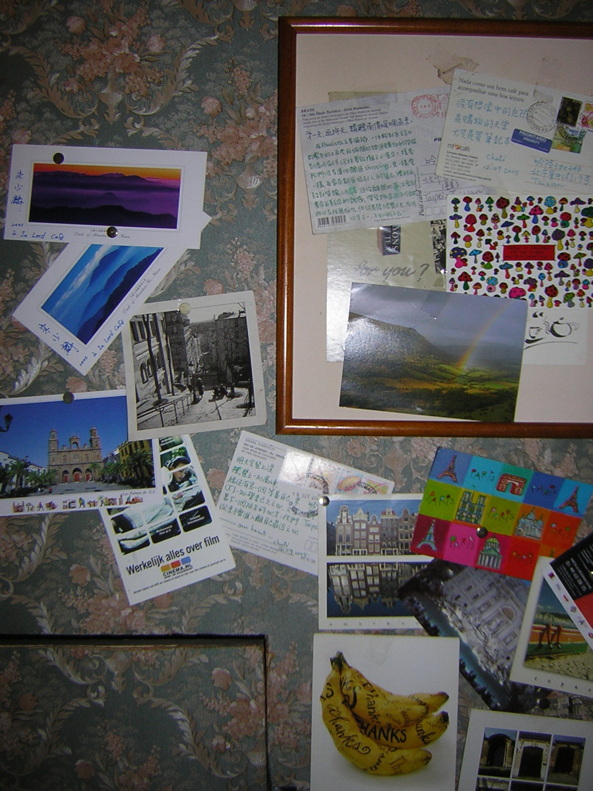 中文（台灣）: 臺北市文山區景中街吟陸咖啡牆上釘著的留給吟陸的明信片，包括朱少麟。